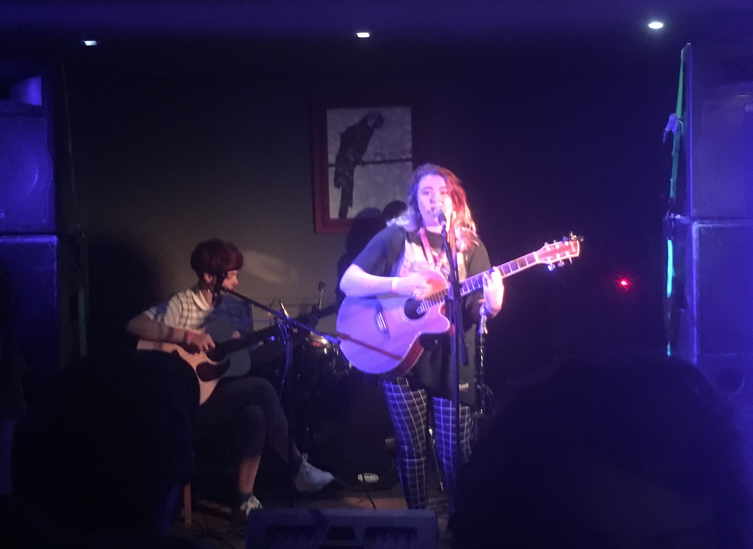 Adwaith yn chwarae yn Tafarn Parrot, Caerfyrddin